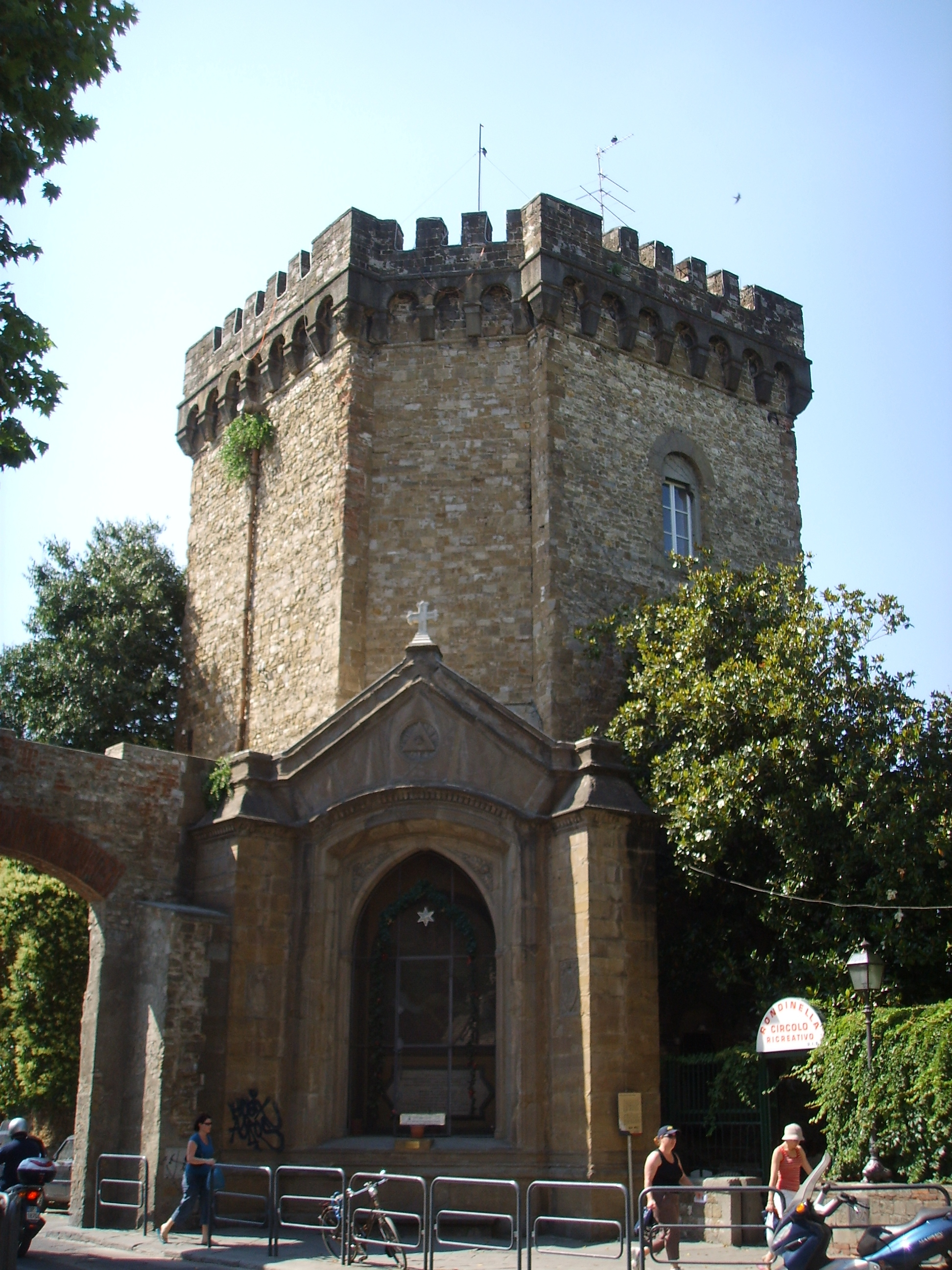 Tabernacolo di Santa Rosa In Florence, italy